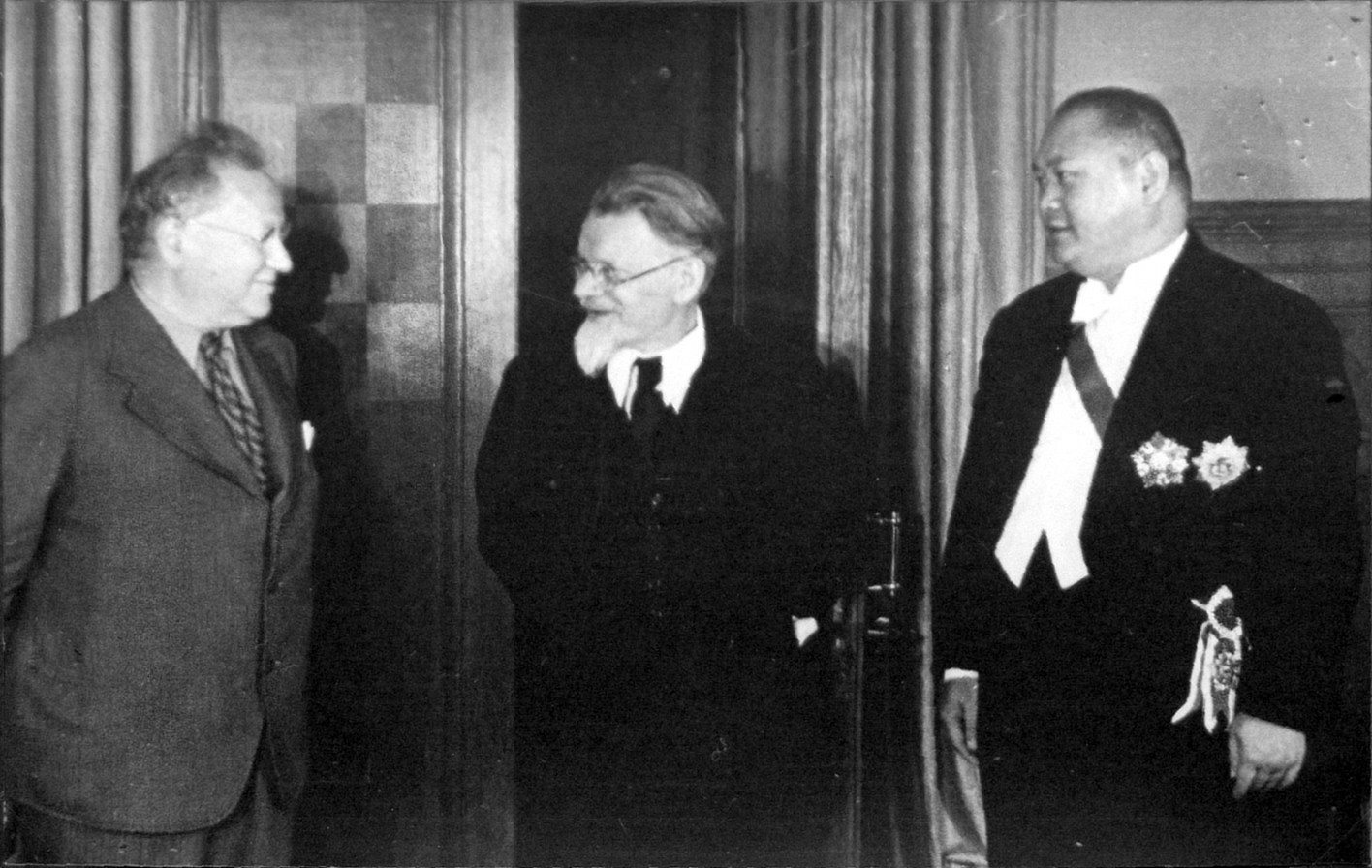 М. М. Литвинов, М. И. Калинин, посол Китайской Республики в СССР Янь Дзе (楊杰 (大理)).